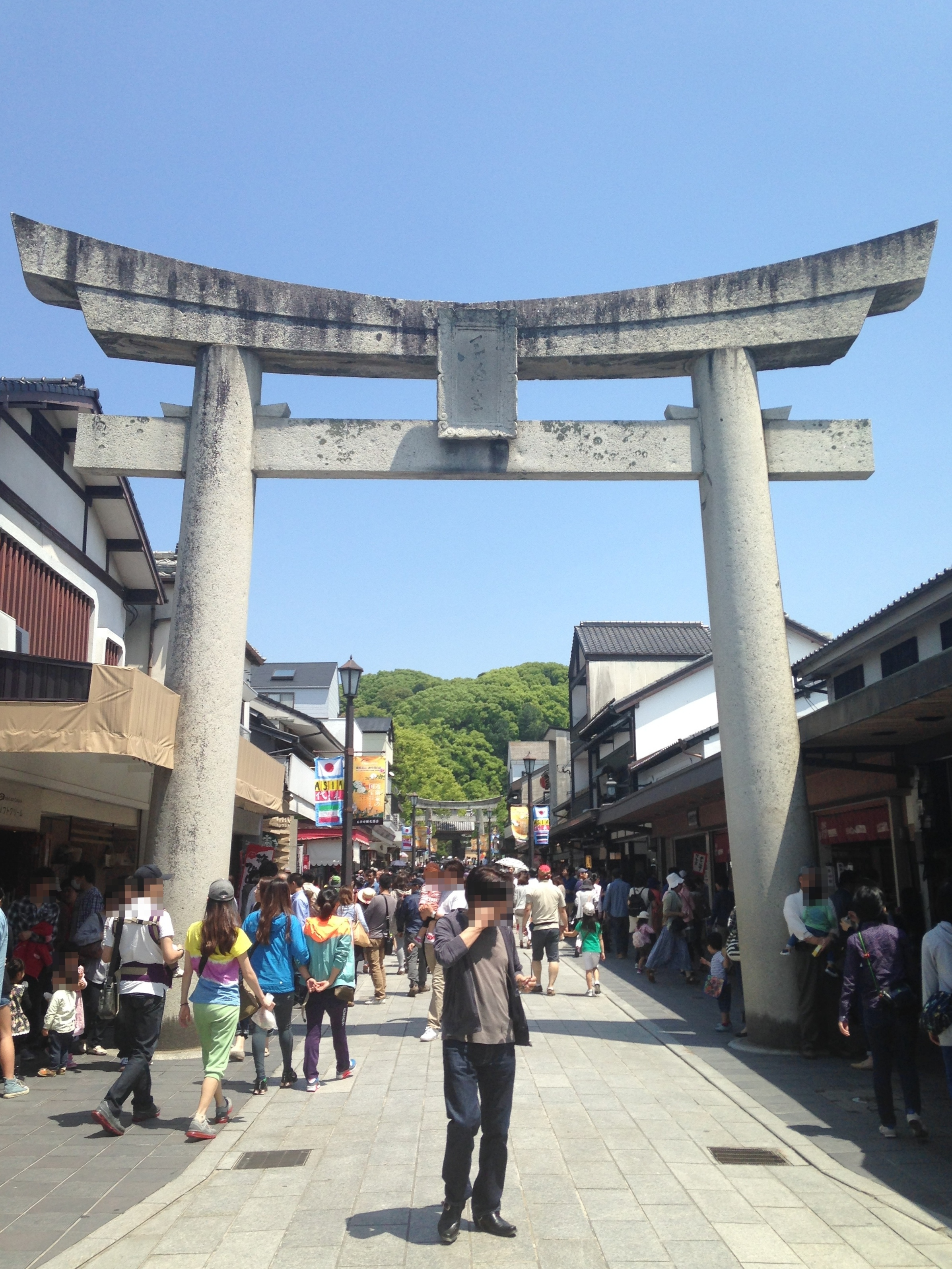 太宰府天満宮・参道の鳥居